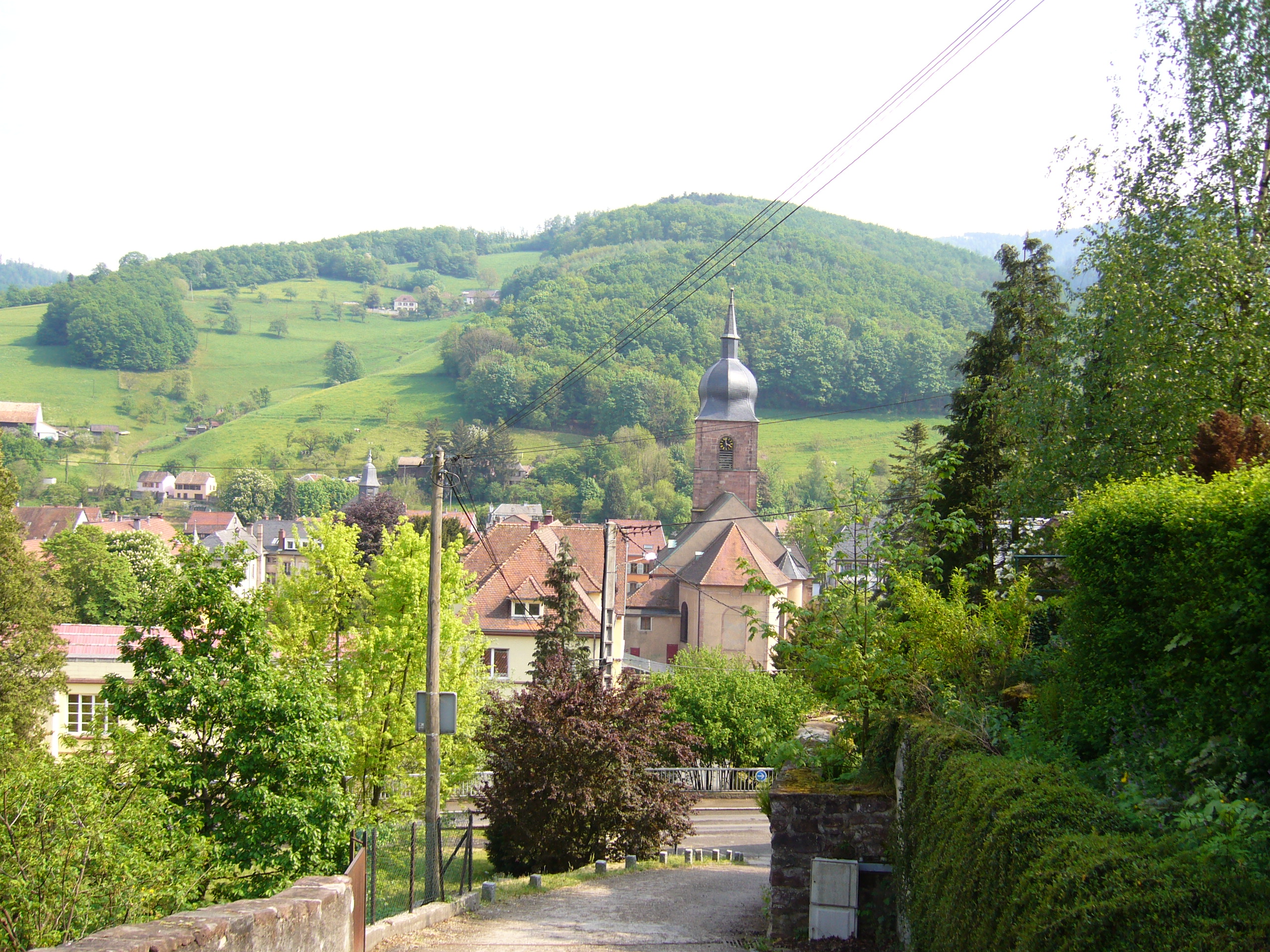 Sainte Marie-aux-Mines 119.JPG